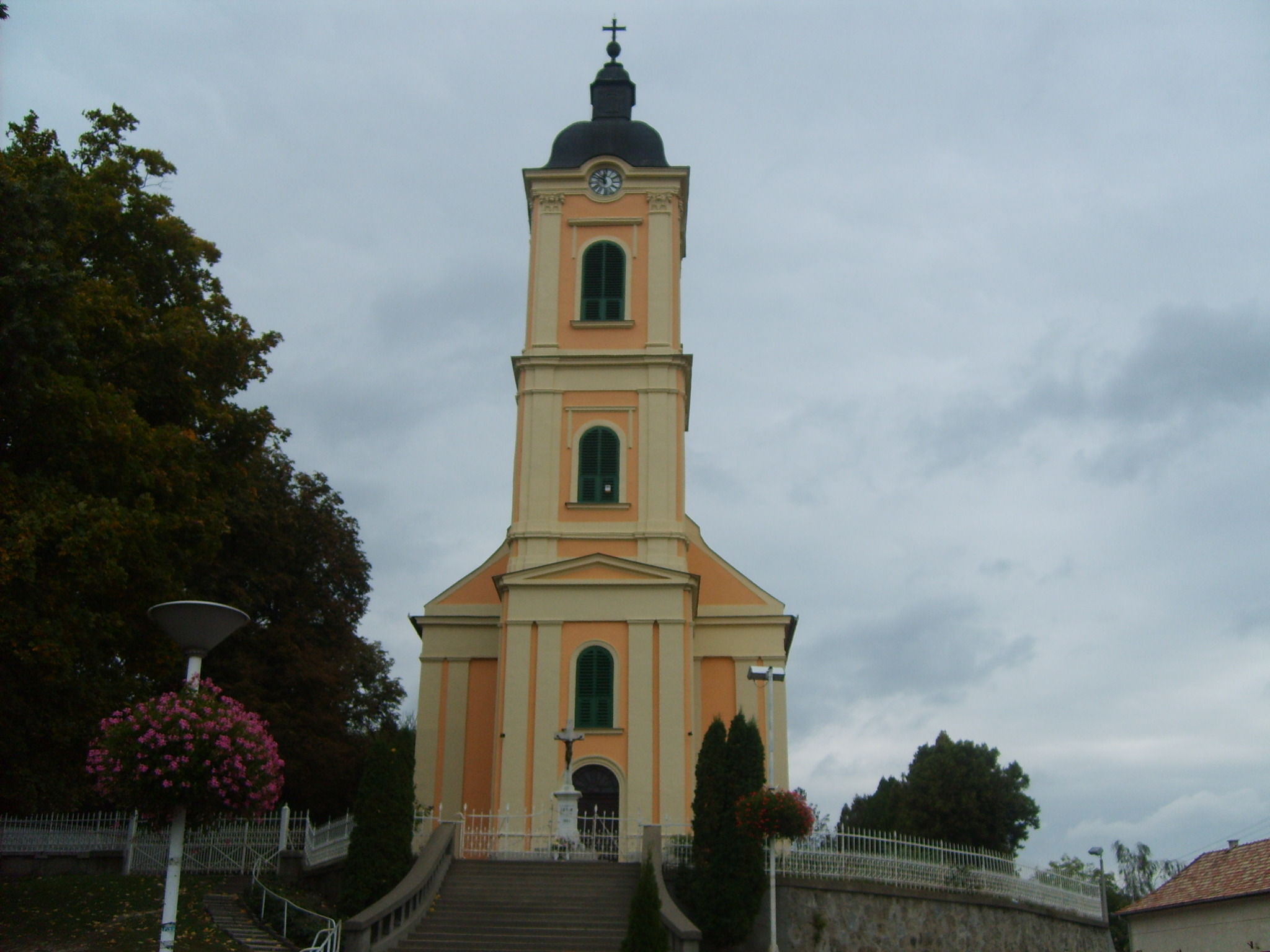 Putnok Szentháromság római katolikus templom